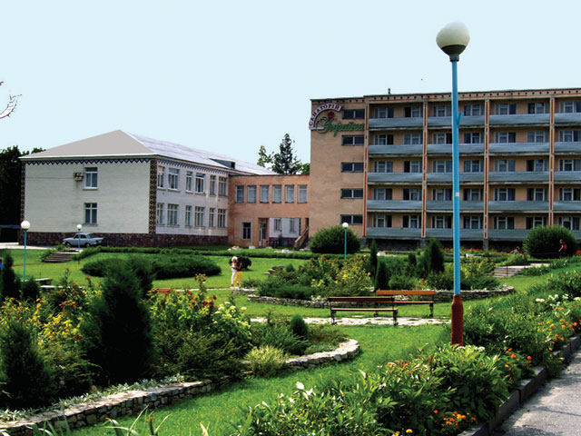 Санаторій "Україна"